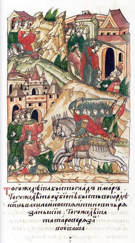 ЛИЦЕВОЙ ЛЕТОПИСНЫЙ СВОД В том же году были голод и мор. В том же году убит был в Орде князь Василий Константинович Рязанский. В том же году татары Рязань воевали.